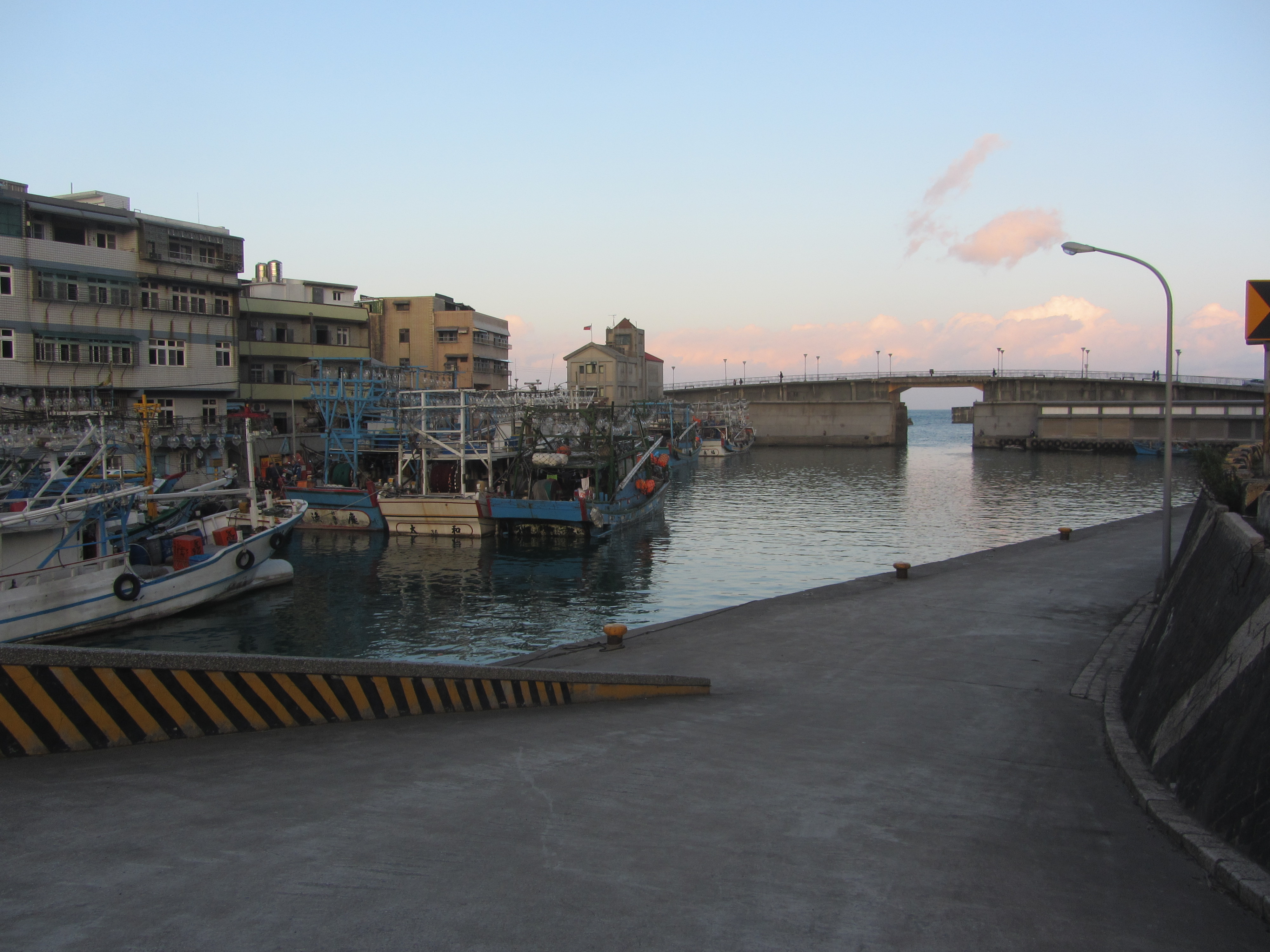 基隆市中正區長潭里漁港